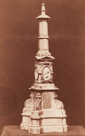 Ontwerp monument voor Willem II, foto van Joseph Dupont